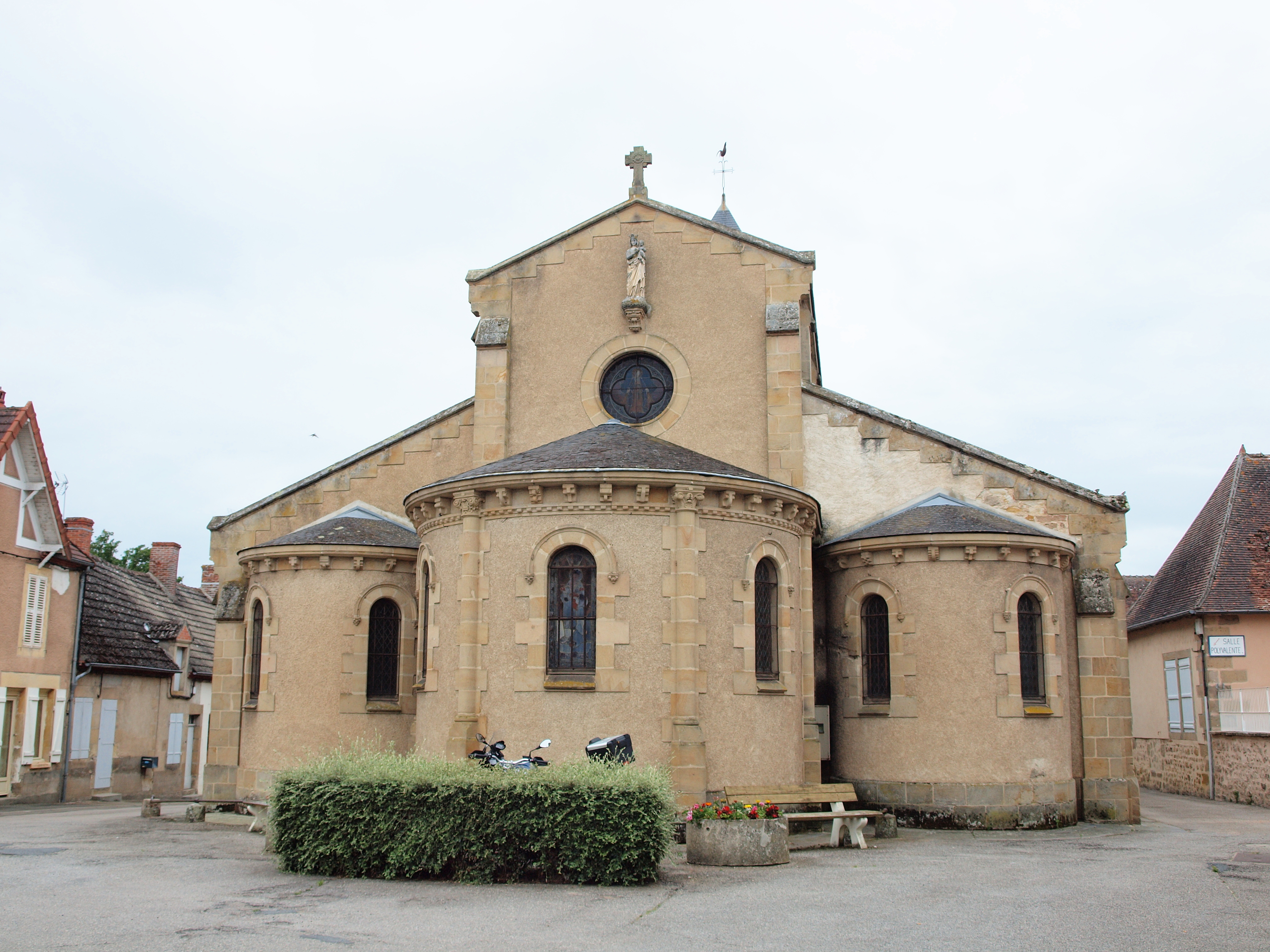 Vieure (Allier, France)